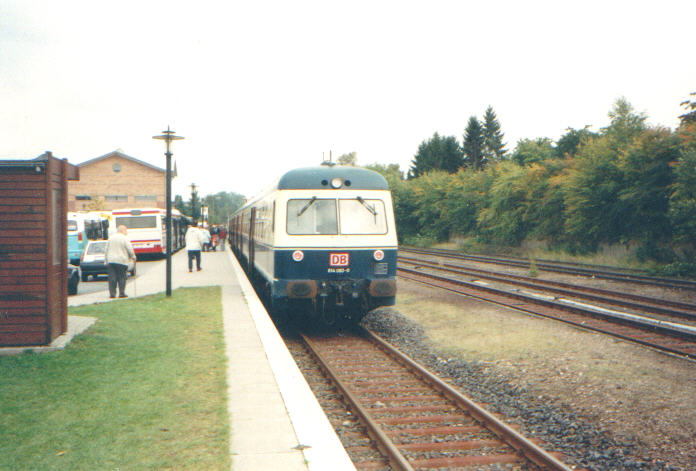 614 083 in Lemgo als Regionalbahn aus Bielefeld (Aus Anlaß eines vom Zweckverband VVOWL in Ostwestfalen durchgeführten Nahverkehrs-Aktionstages wurden die Regelzüge zwischen Bielefeld und Lemgo verstärkt. Anstelle der beiden einzelnen 628 verkehrte ein Braunschweiger 614 und eine 628-Doppeleinheit.)